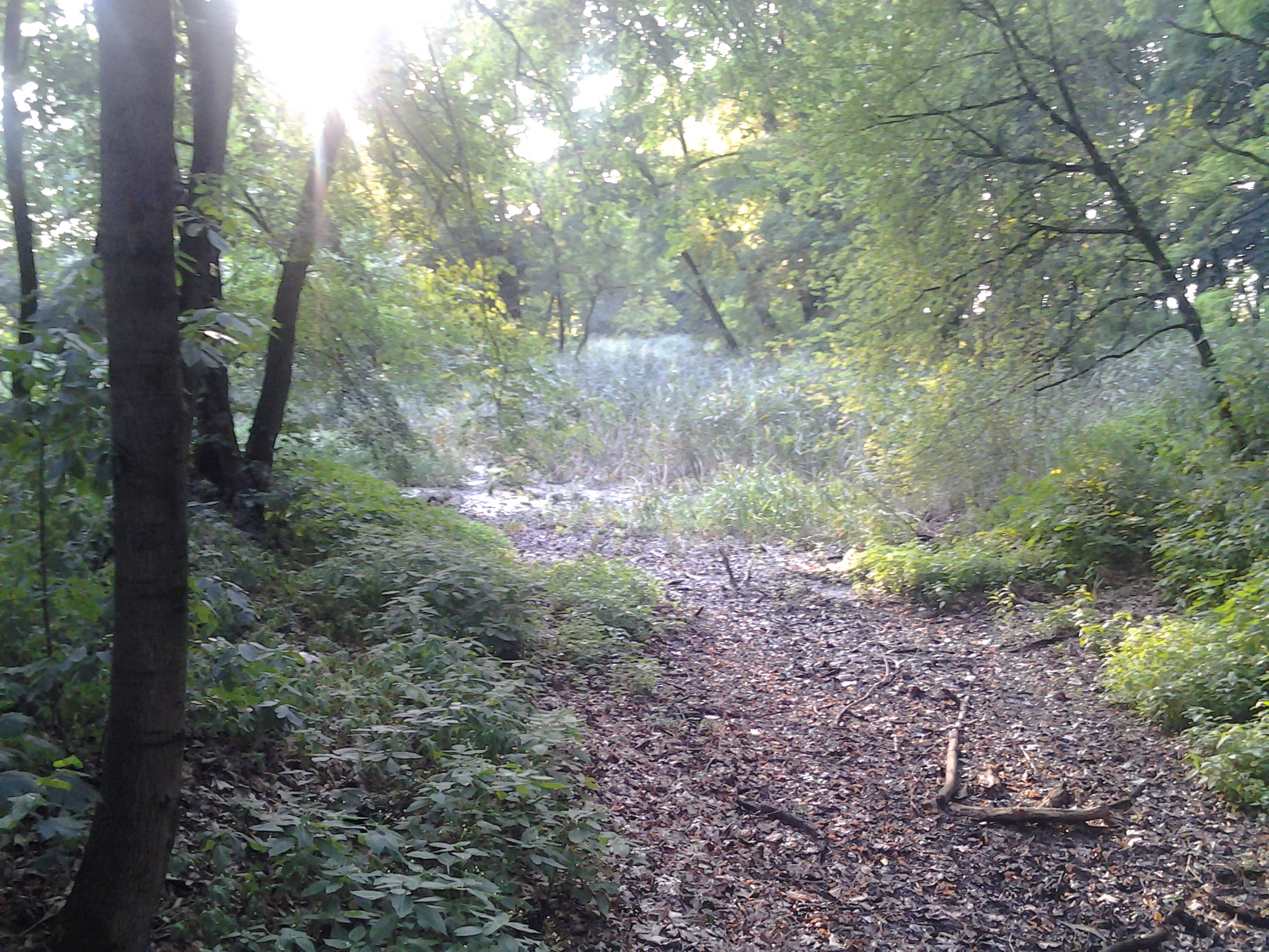 Komorno — park, 1858, pocz. XX w.